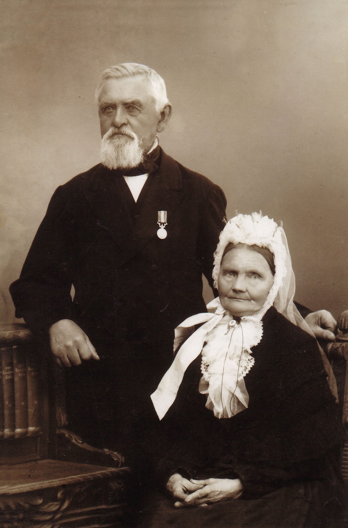 Fhv. stortingsmann Anders Sandstad (1804–1904) og hustru Christiane Johanne (født Møen) (1807–1899).